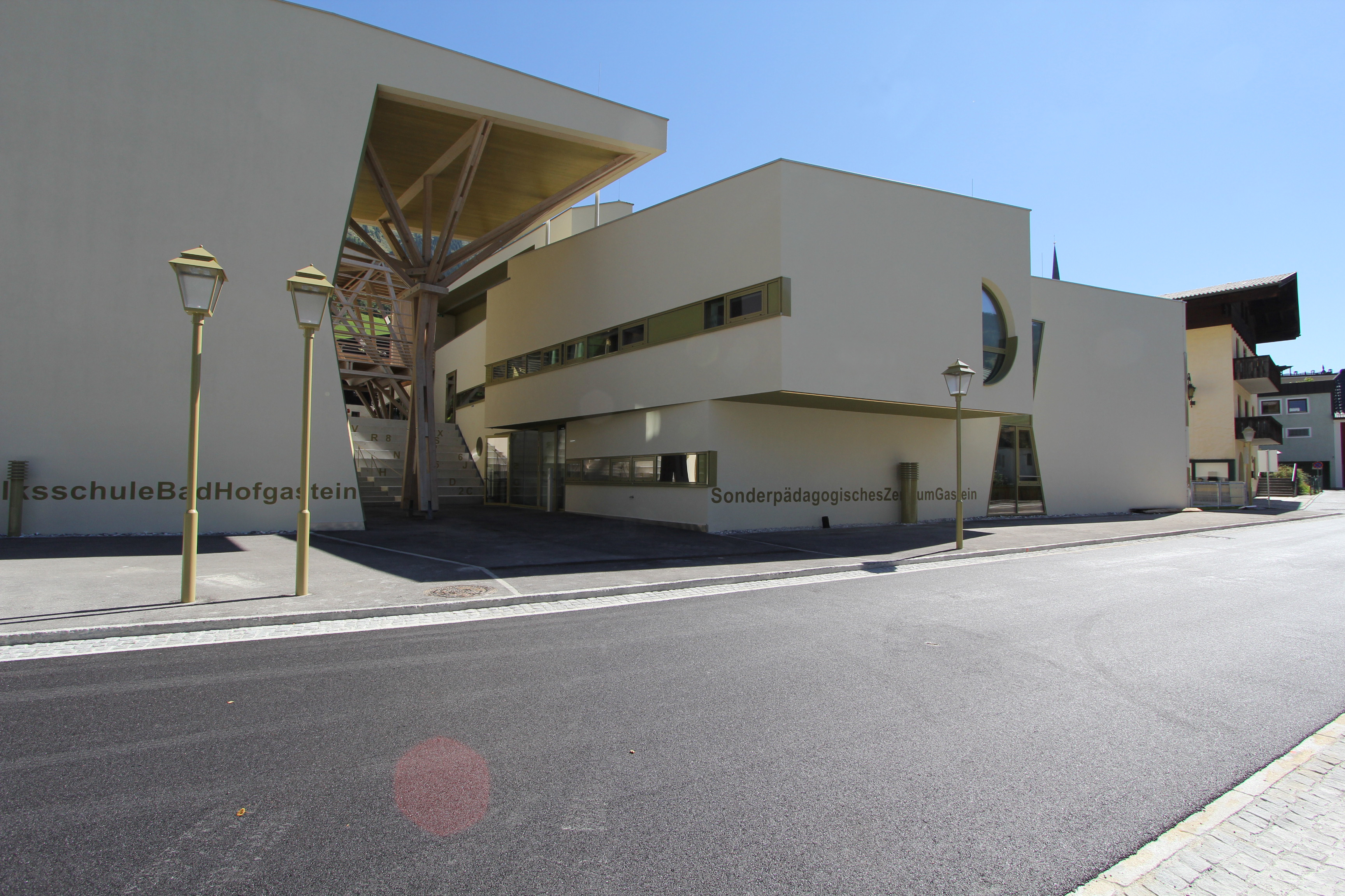 maxRieder work.